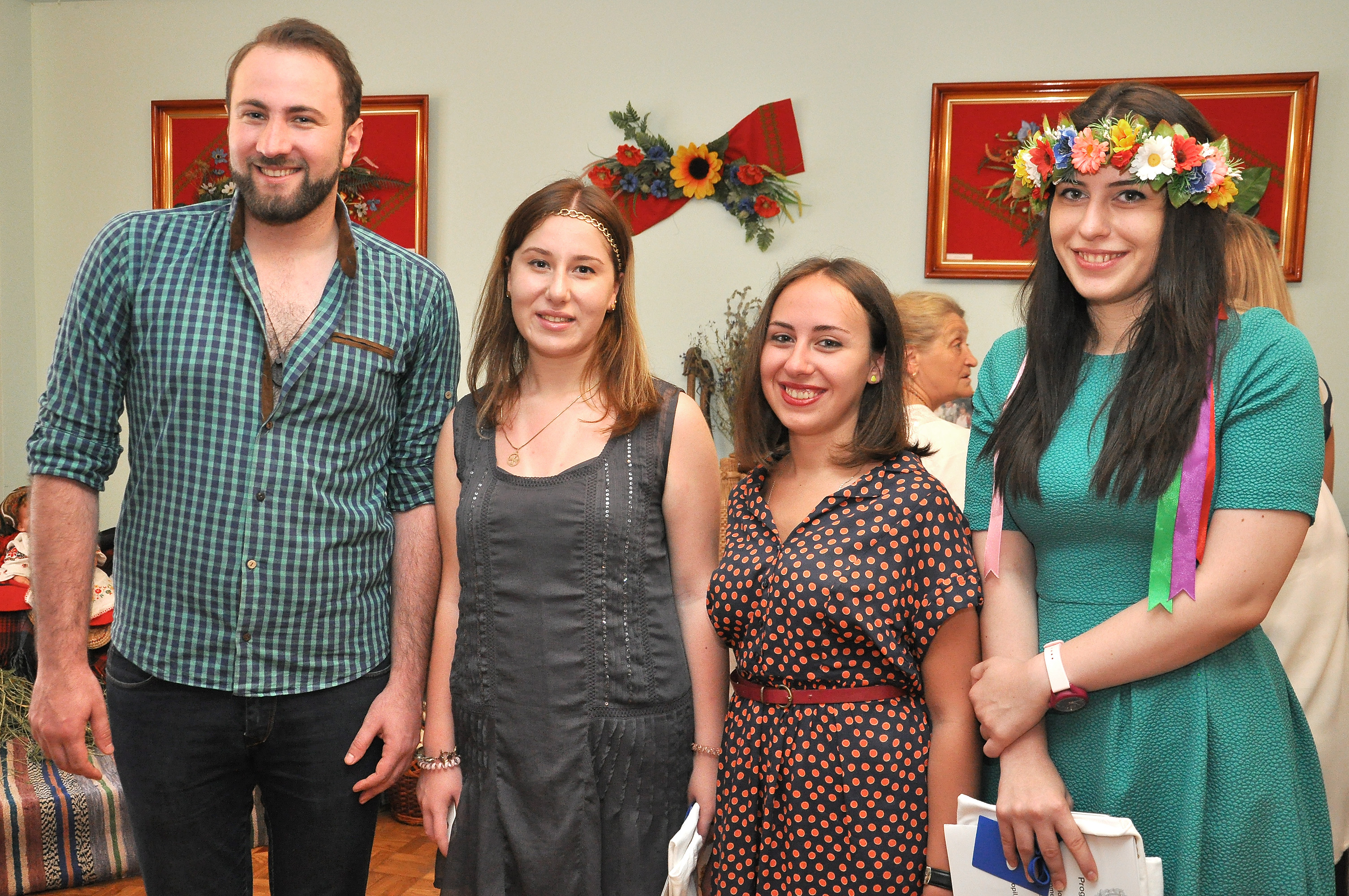 X Літні міжнародні студентські школи в НОК «Червона калина» Тернопільського державного медичного університету імені І. Я. Горбачевського. Гості з Тбіліського державного медичного університету.